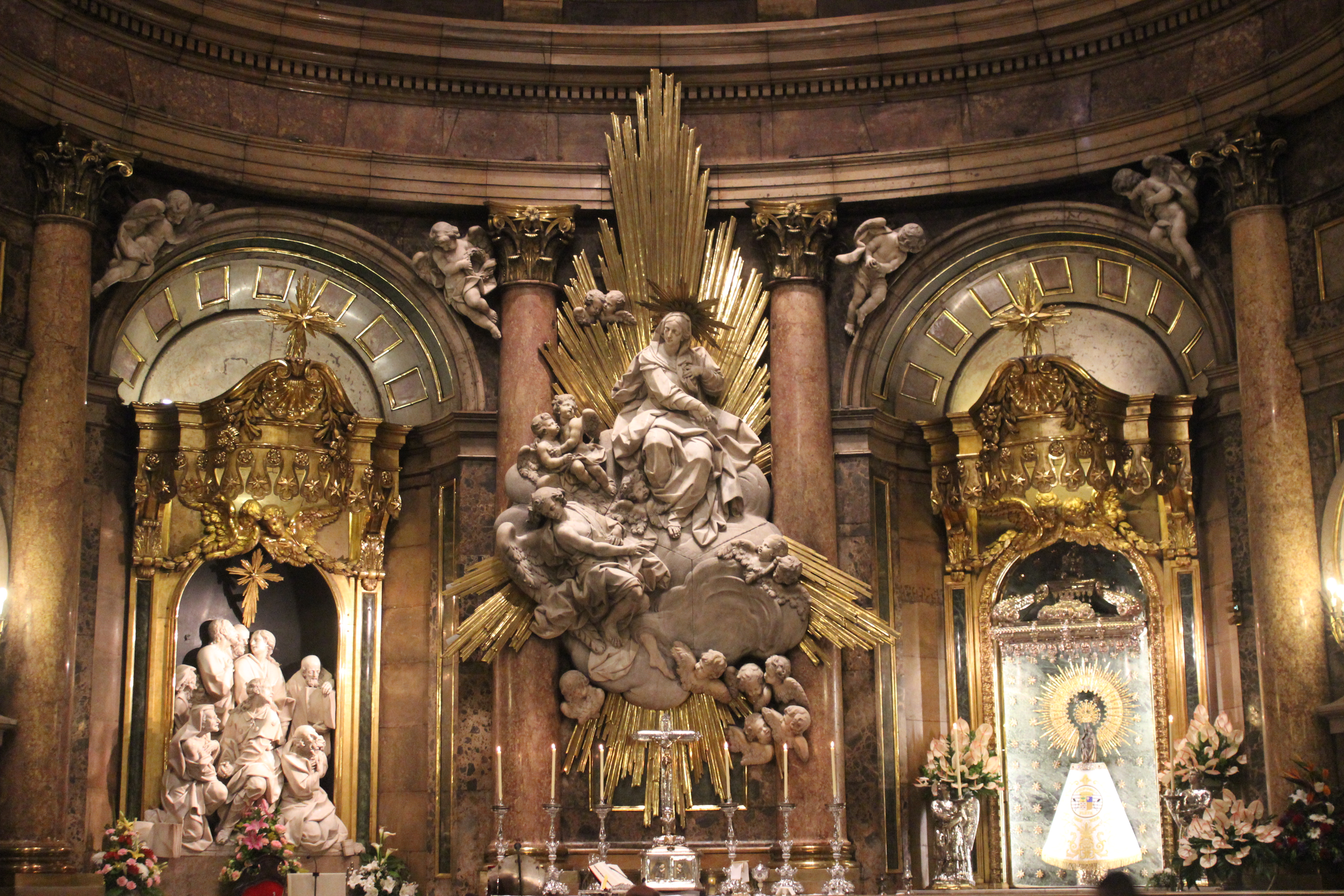 Santa Capilla del Pilar de Zaragoza. Altar con la Venida de la Virgen de José Ramírez de Arellano.